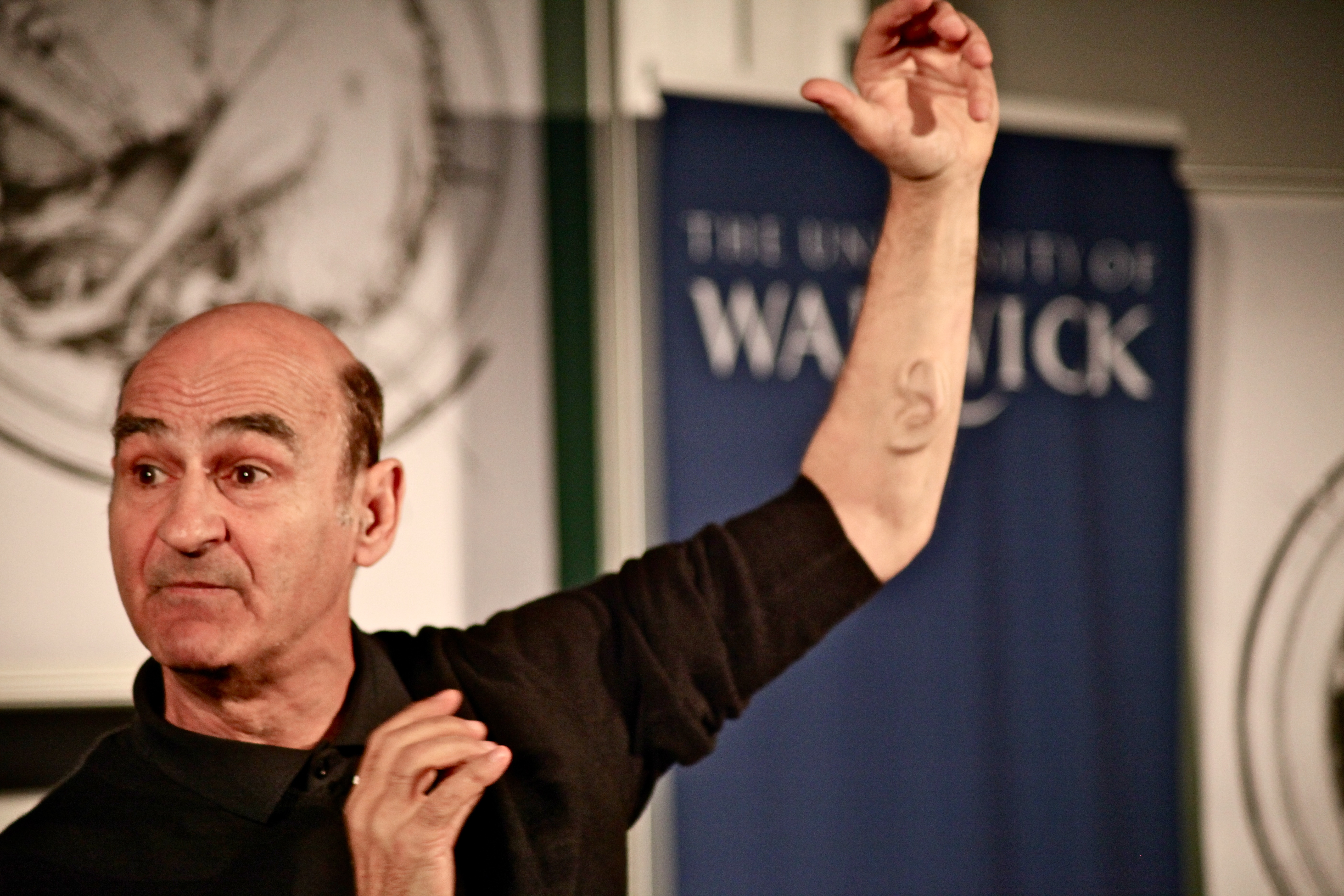 Stelarc at VirtualFutures